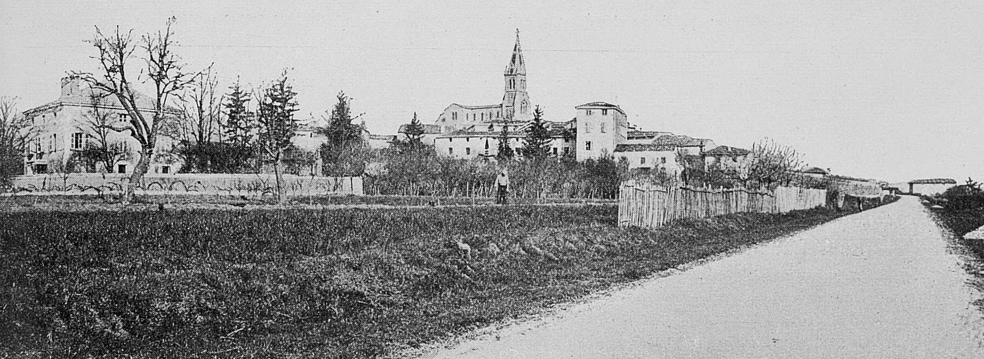 Dictionnaire illustré des communes du département du Rhône. Tome 1 / par MM. E. de Rolland et D. Clouzet.